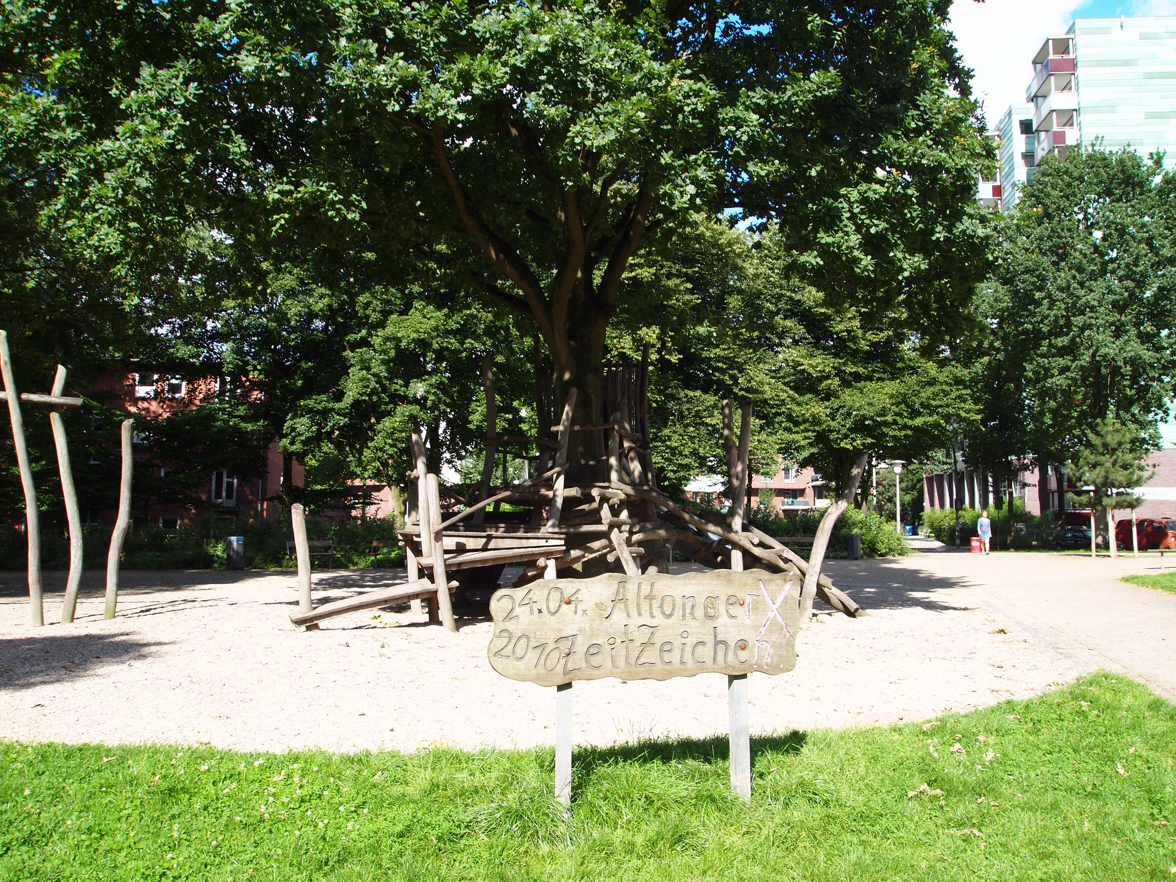 Altonaer Zeitzeichen vom 24.04.2010, in Erinnerung an die Baumbesetzung im Gählerpark im Winter 2009 / 2010